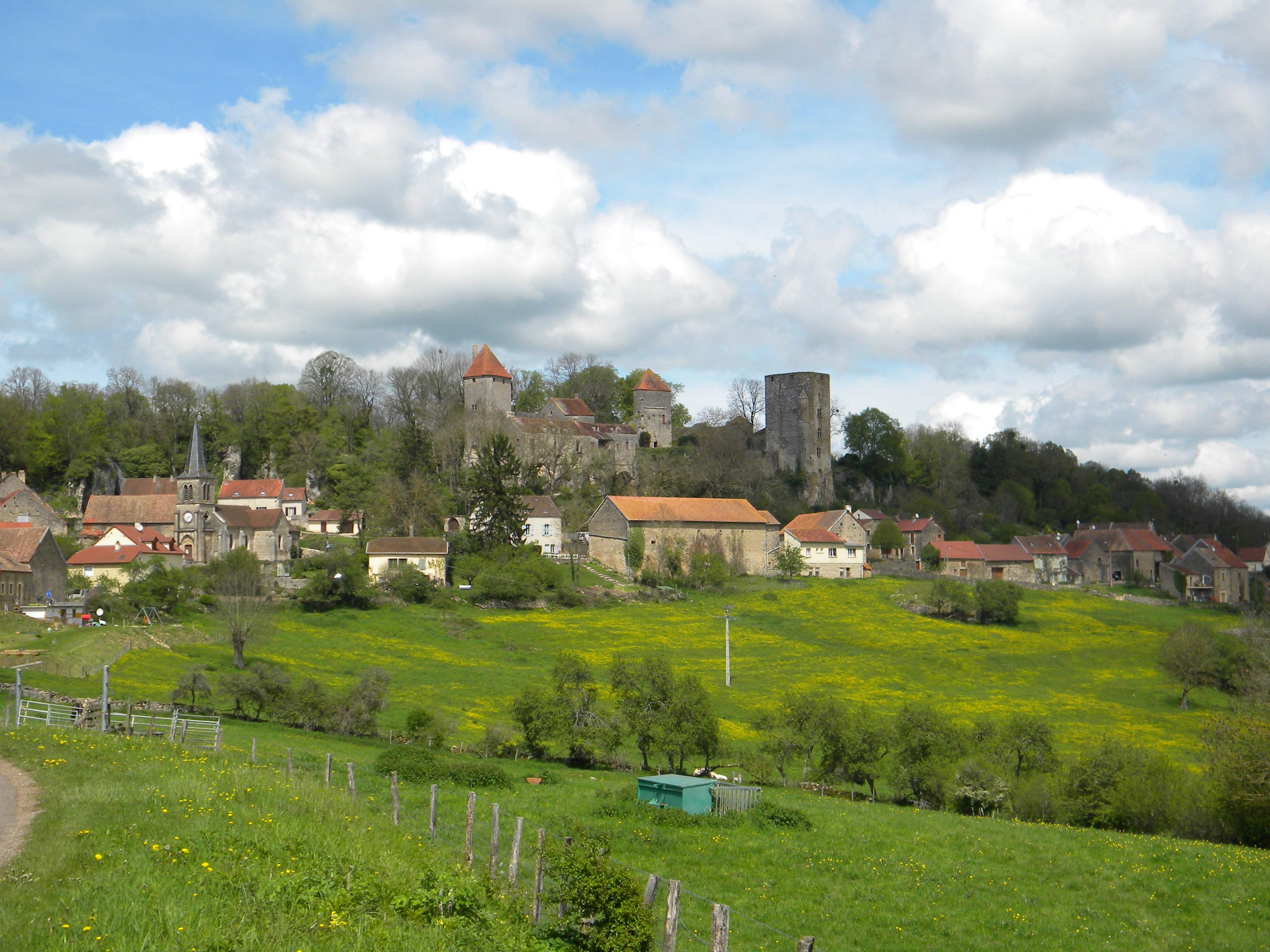 Chaudenay-le-Château